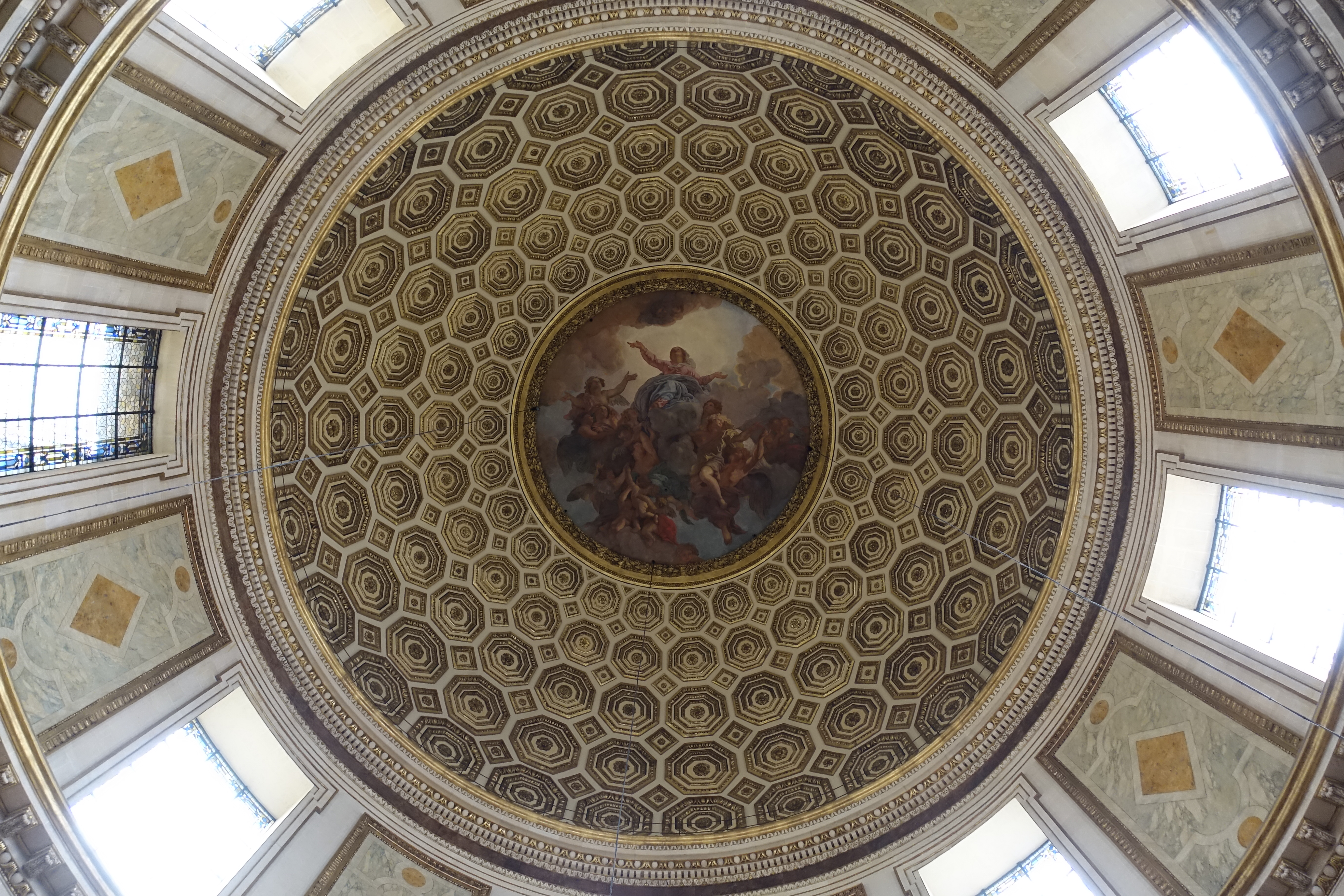 Dome @ Eglise Notre-Dame de l'Assomption @ Paris Église Notre-Dame-de-l'Assomption, Paris, France.